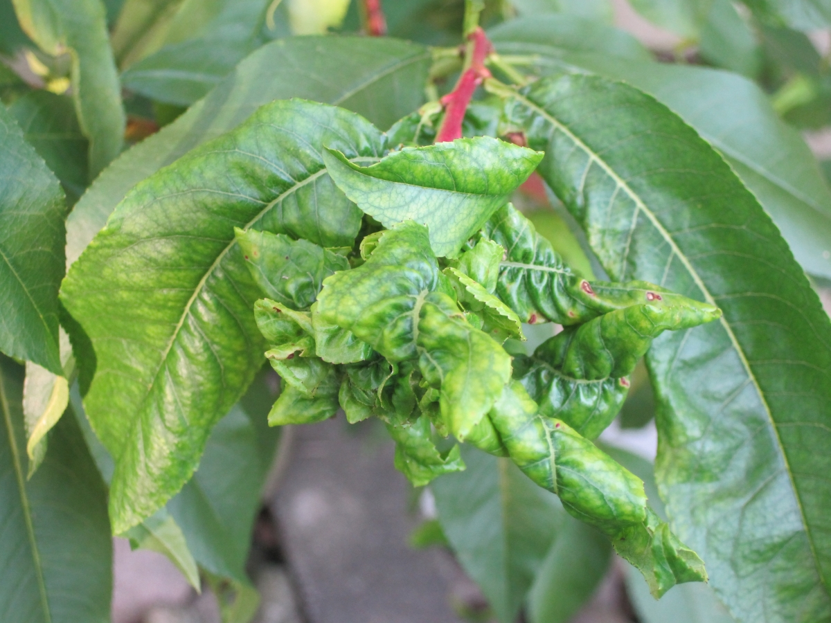 Von der Kräuselkrankheit befallener Pfirsichbaum